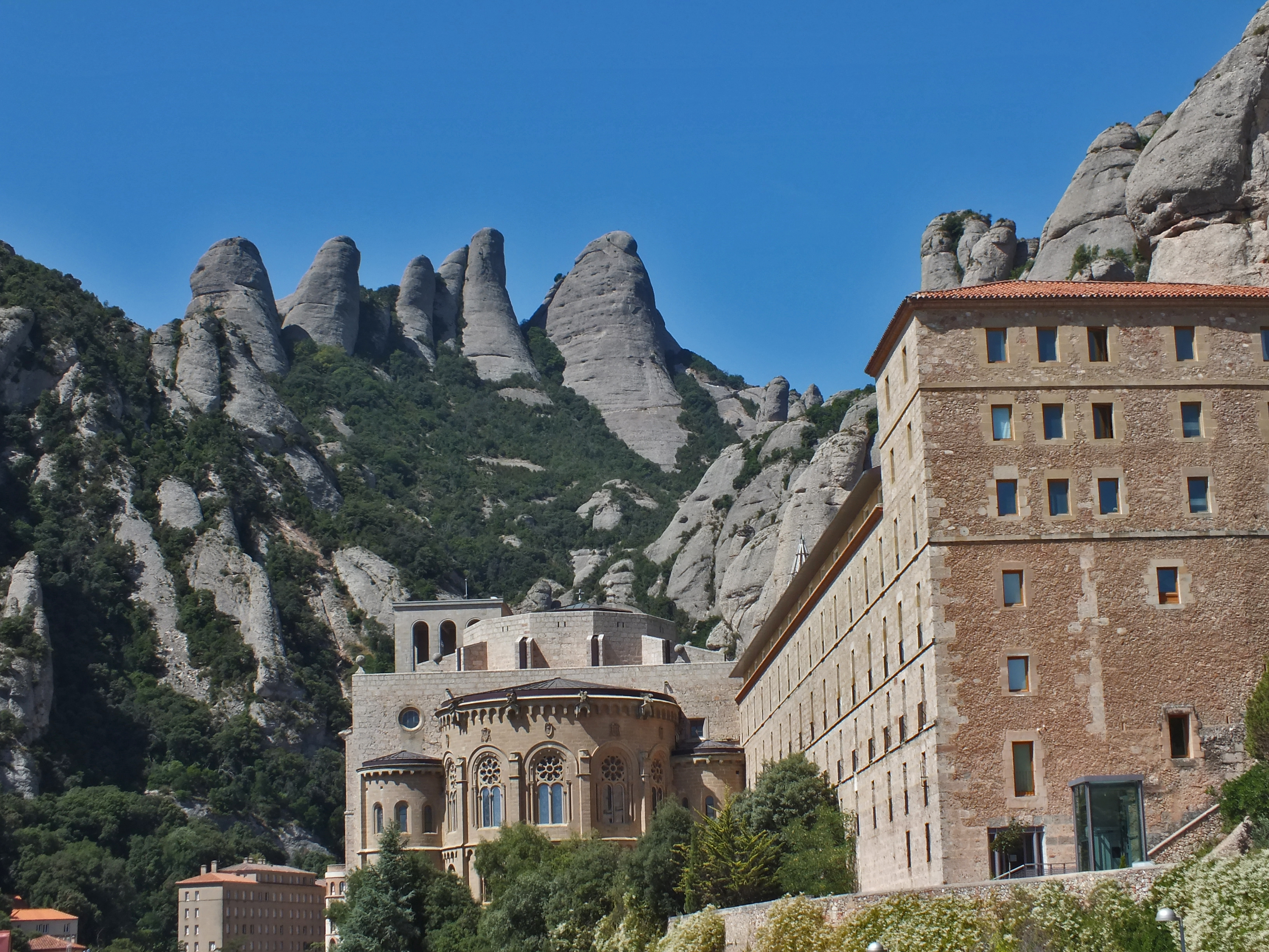 Monasterio de Montserrat